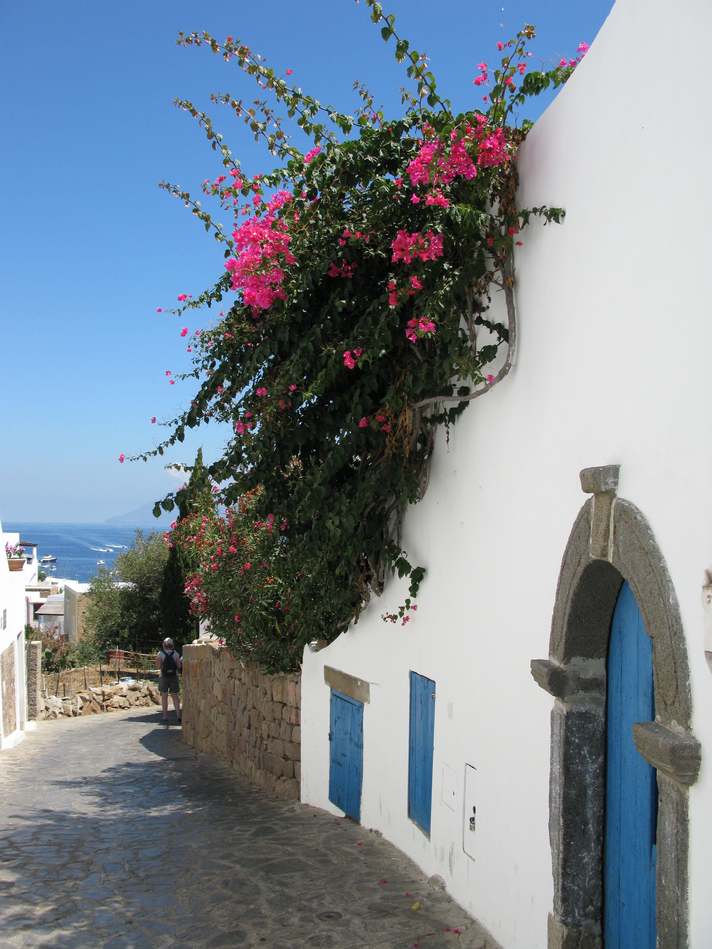 panarea